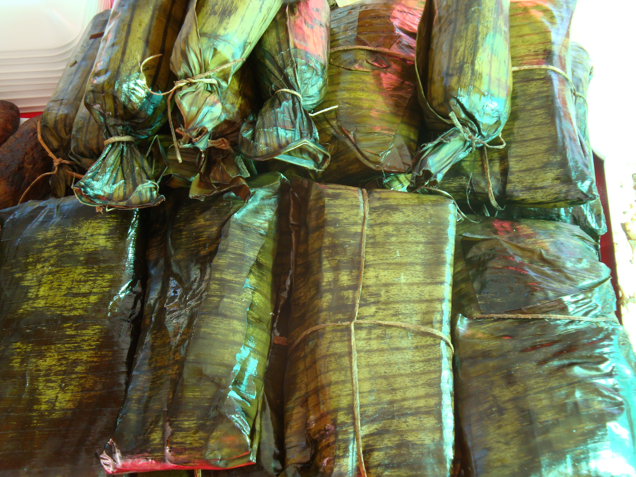 Tamales envueltos en hoja de plátano, típicos de la gastronomía del estado mexicano de Tabasco.